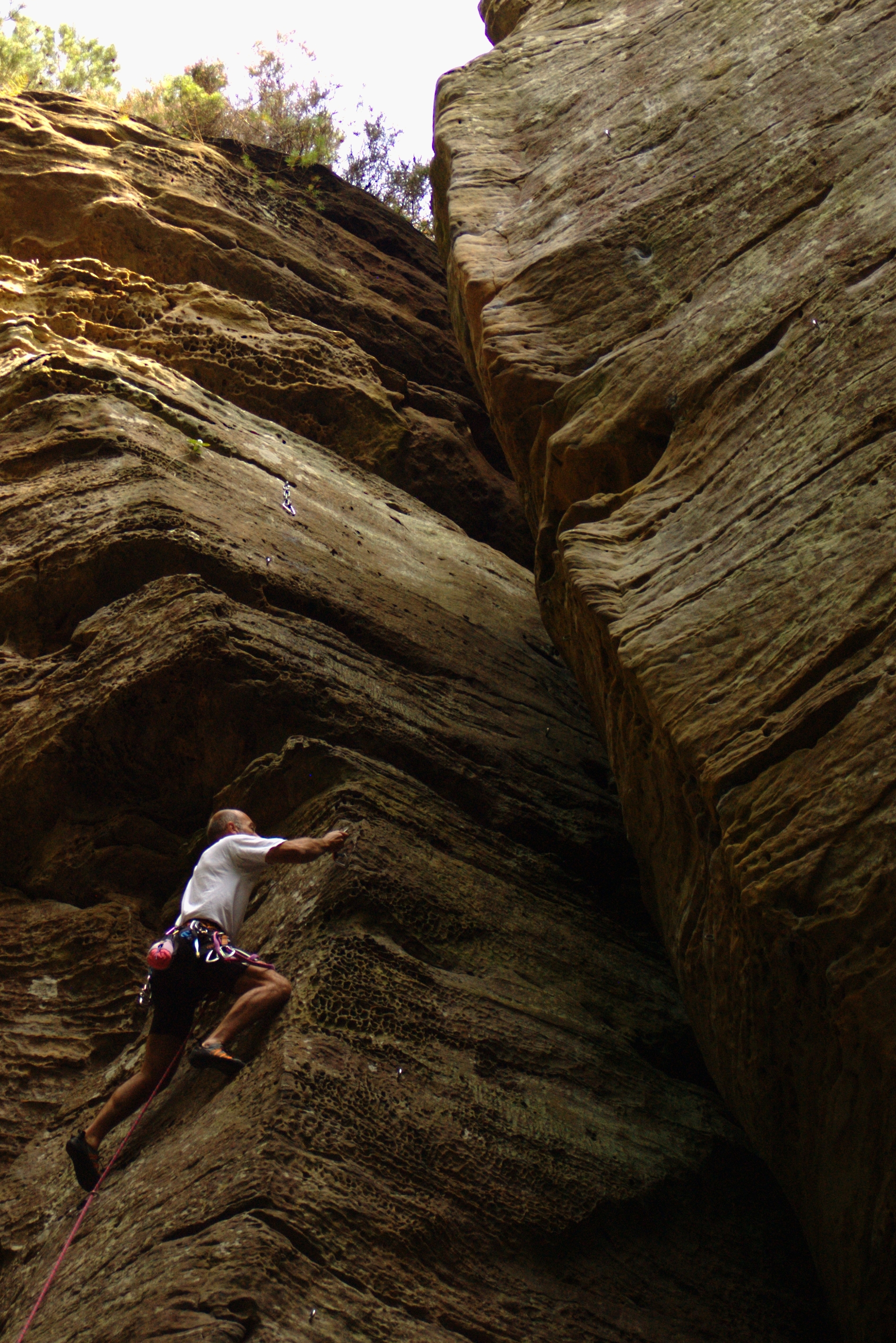 Kletterer in der kleinen Schweiz nahe Berdorf.